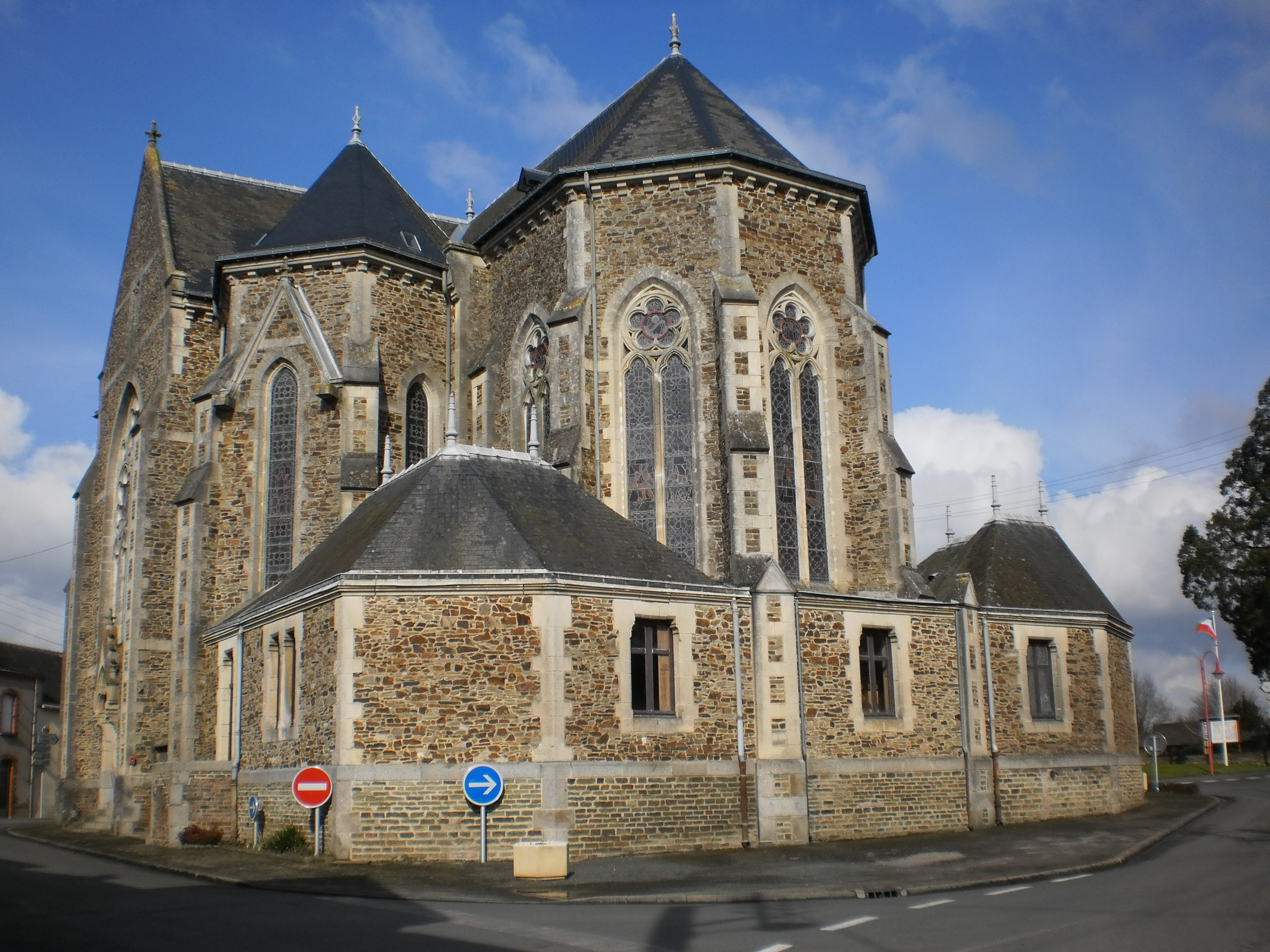 Le Pin (Loire-Atlantique, France) - église